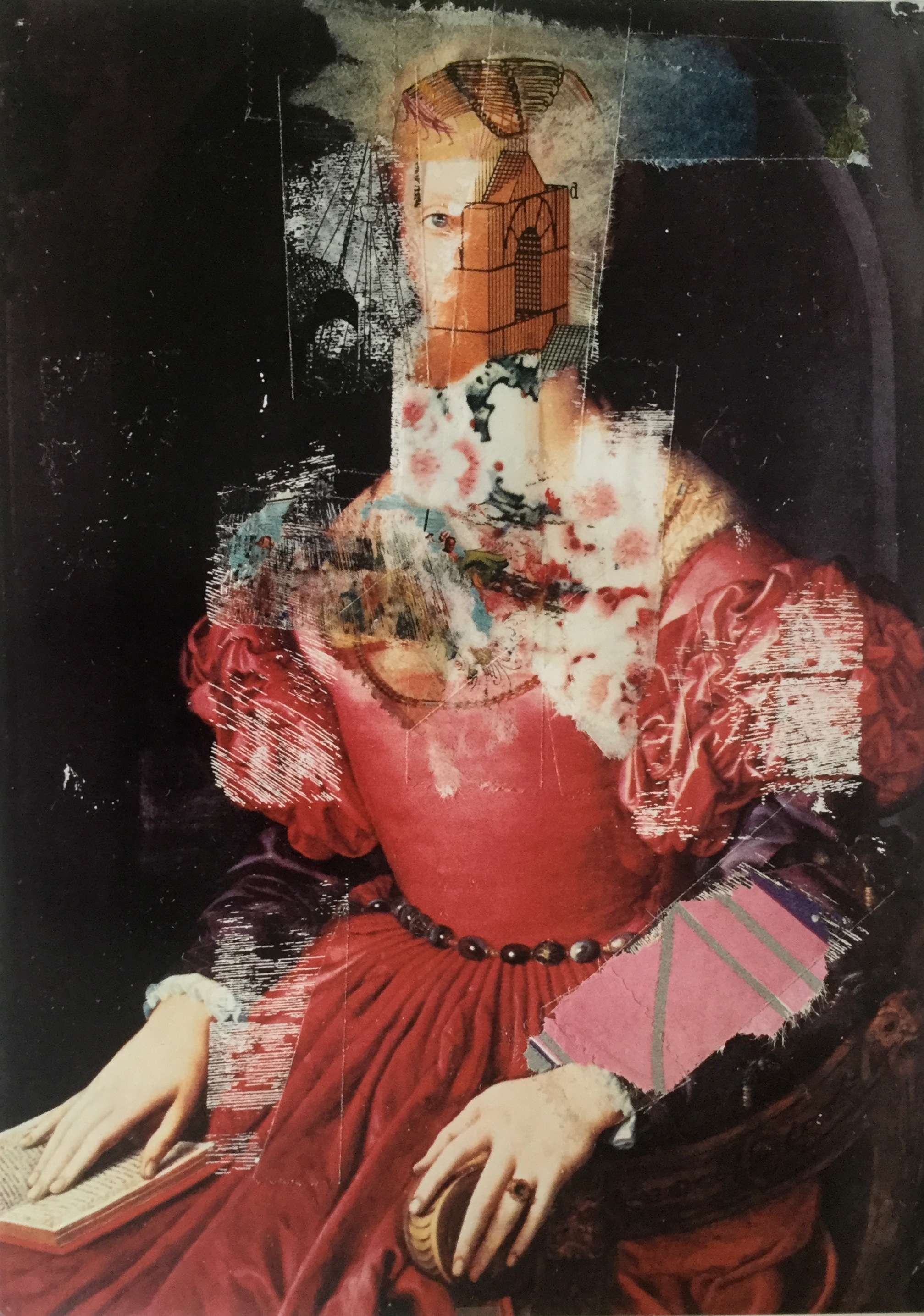 Dominik Steiger, „Ohne Titel“, o. J. (um 1999). Aus der Serie „Kulturcollagen“. Vergrößerung nach Tixo-Collage auf Postkarte, 70,5 x 51 cm.